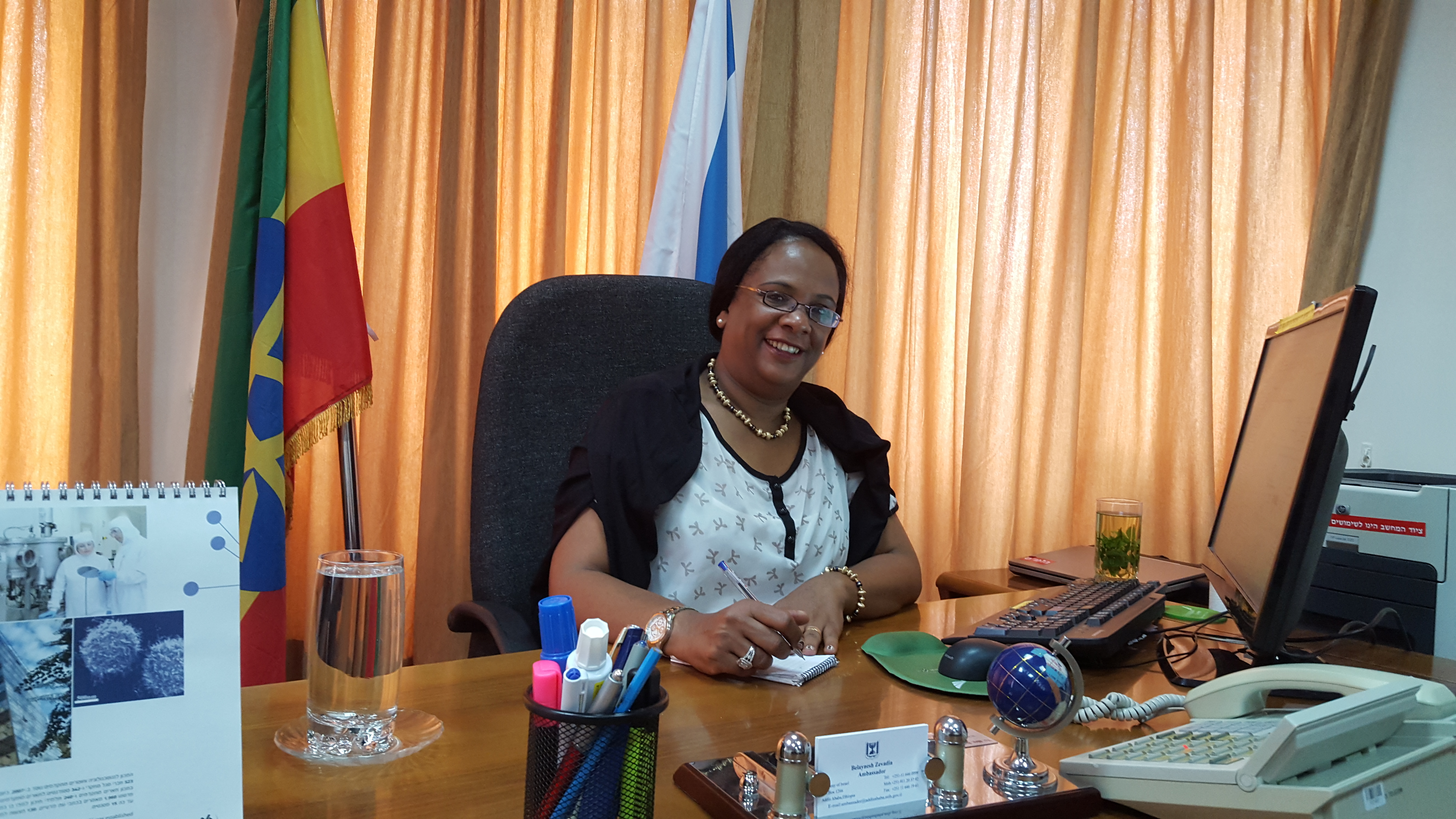 בליינש זבדיה, שגרירת ישראל באתיופיה.